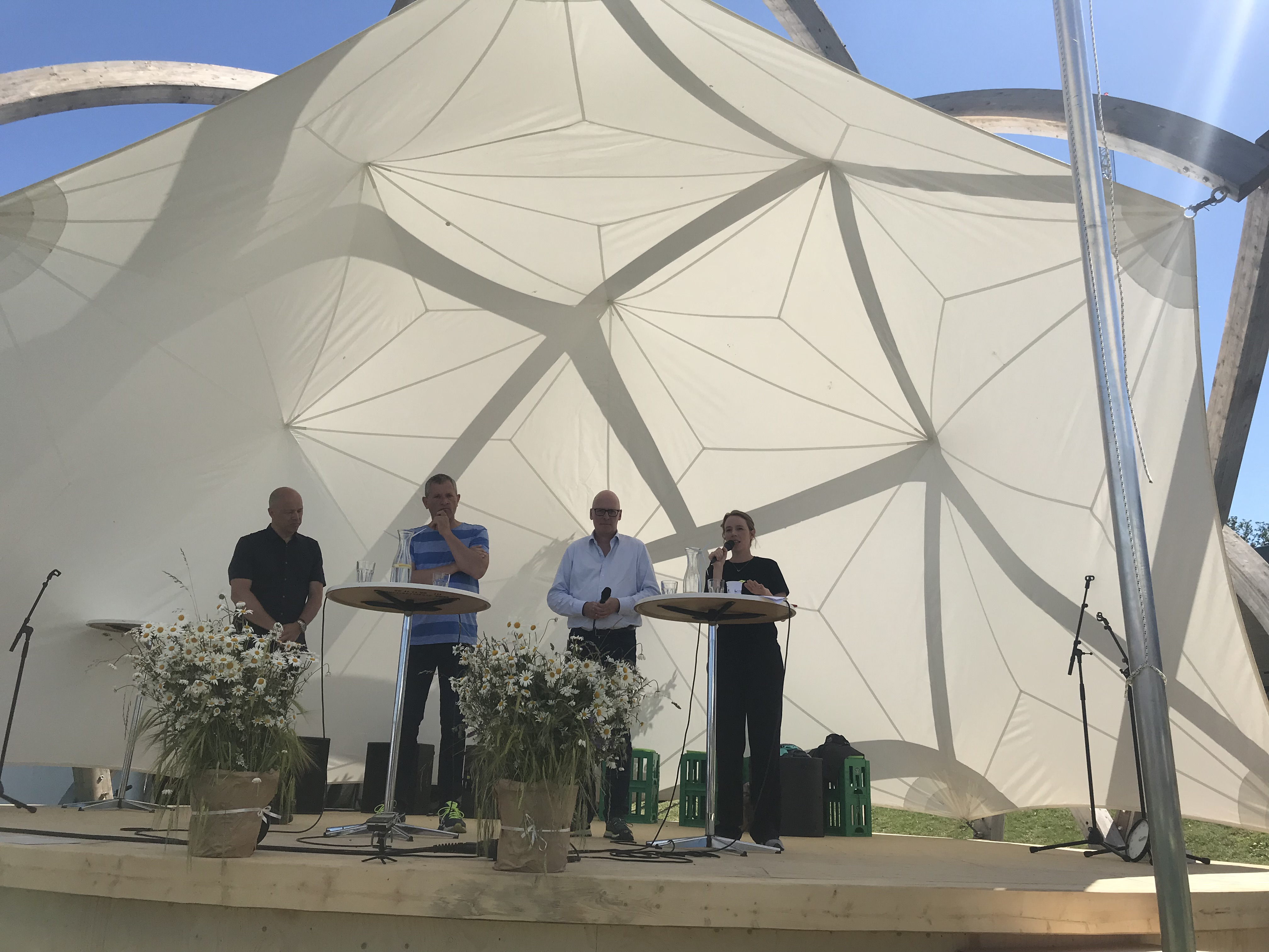 Wind Denmark på Energiens Scene på Bornholm, Folkemødet 2019.